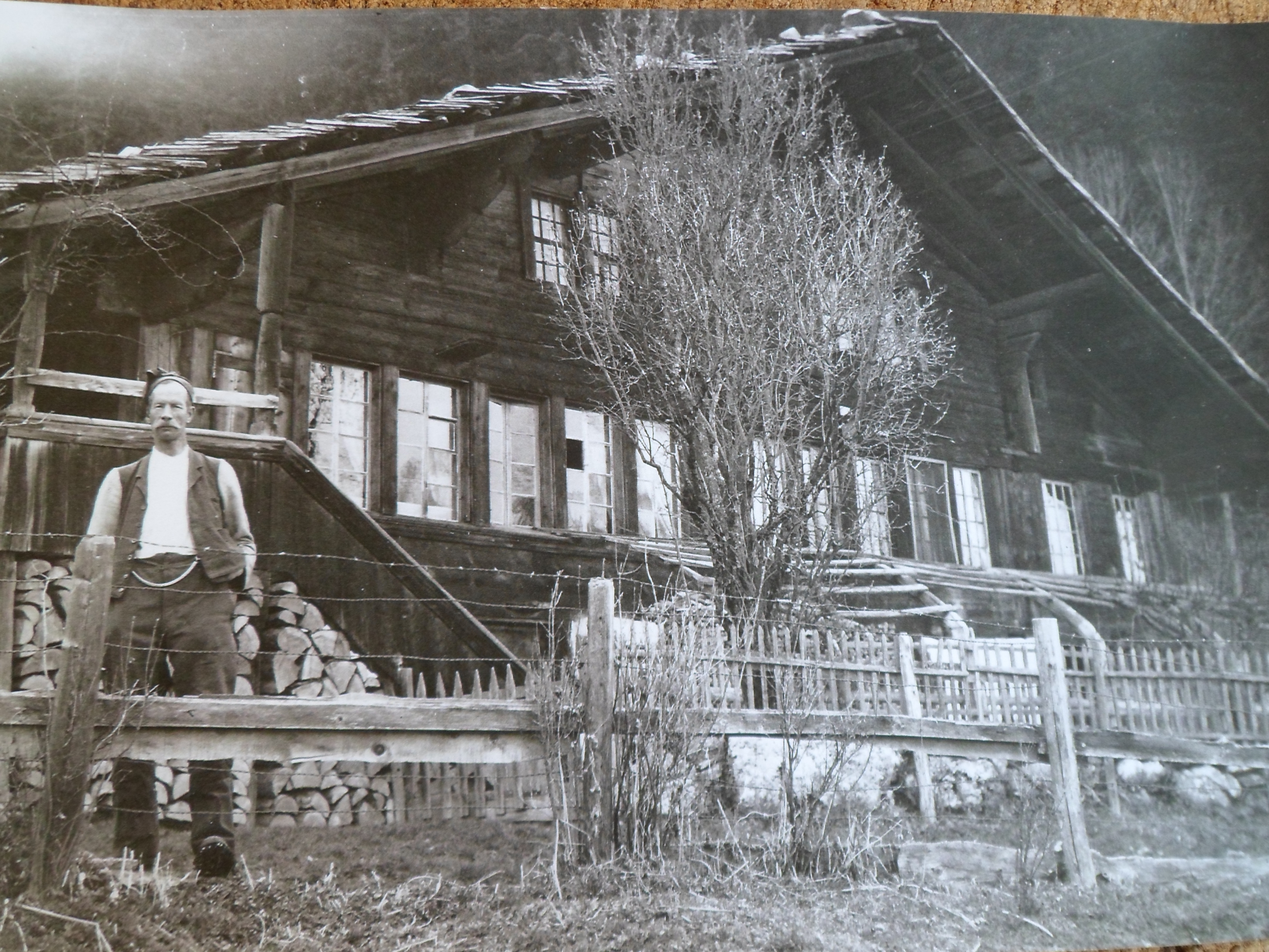 Jakob Amman's Haus aus dem 17. Jahrhundert (Photo ca. von 1900)